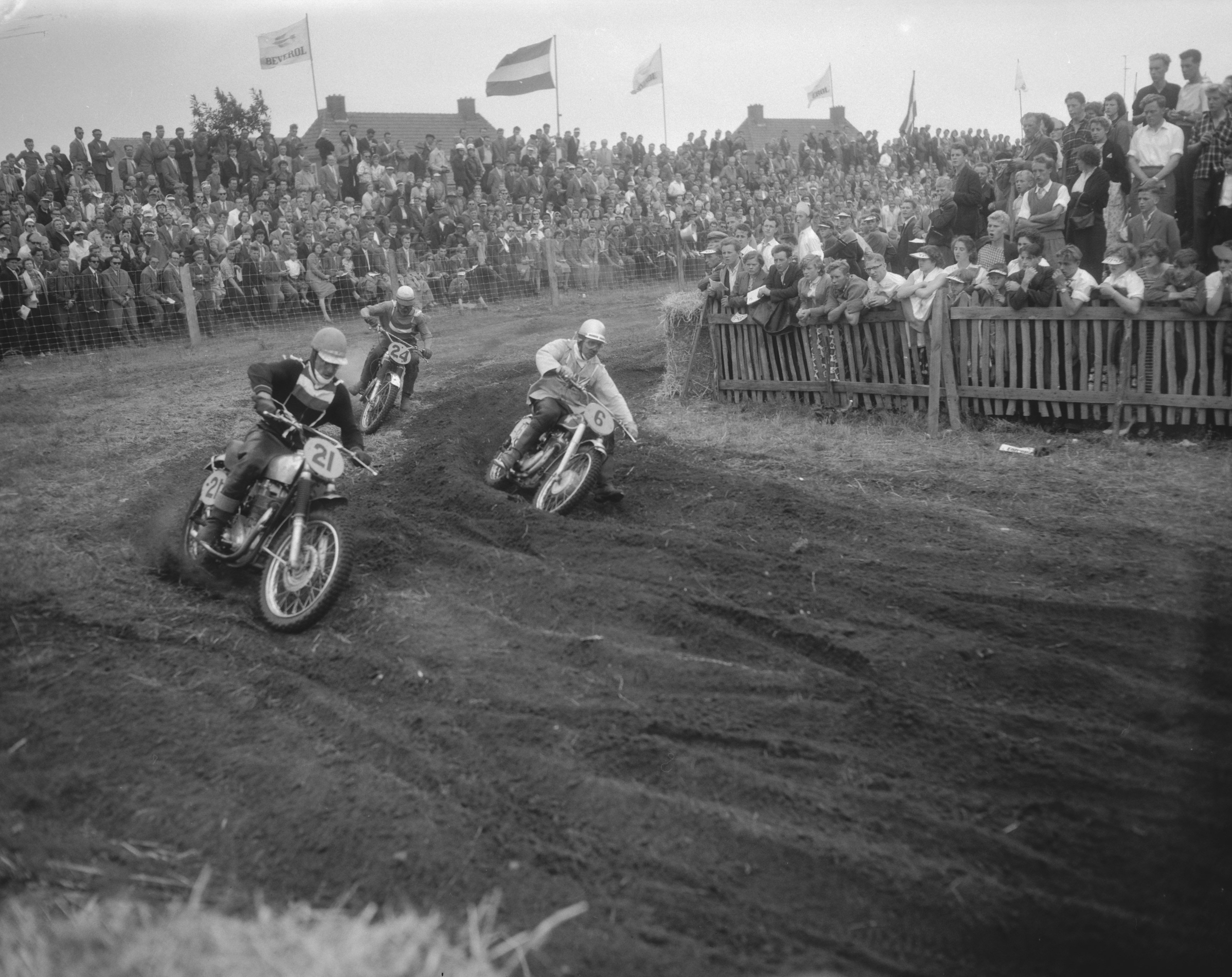 Collectie / Archief : Fotocollectie Anefo Reportage / Serie : [ onbekend ] Beschrijving : Grote prijs van Nederland motorcross in St. Anthonis Datum : 27 juli 1958 Trefwoorden : MOTORCROSSEN, PRIJS Fotograaf : Pot, Harry / Anefo Auteursrechthebbende : Nationaal Archief Materiaalsoort : Negatief (zwart/wit) Nummer archiefinventaris : bekijk toegang 2.24.01.04 Bestanddeelnummer : 909-7447